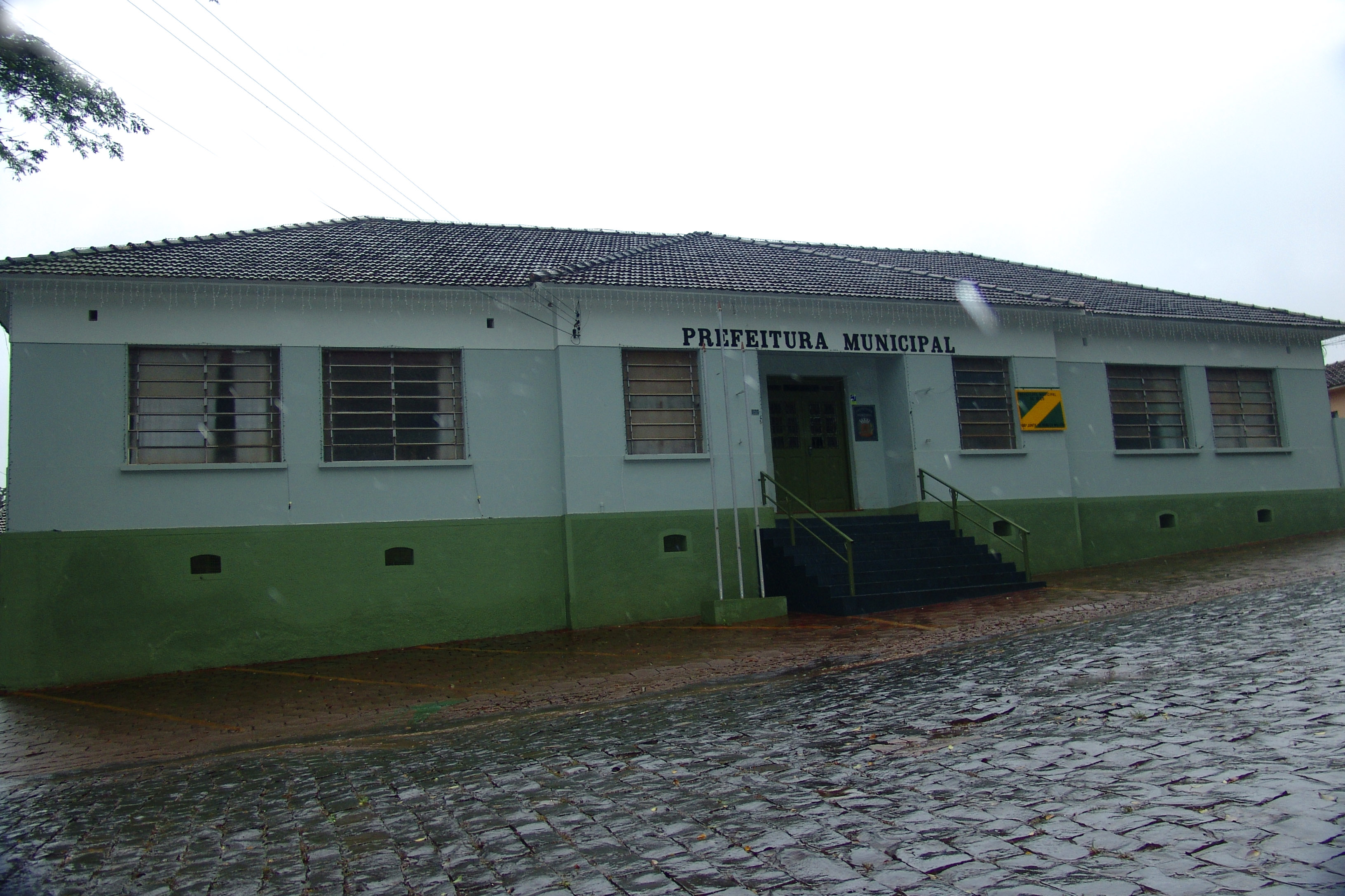 Prefeitura do município de Óleo, São Paulo, Brasil